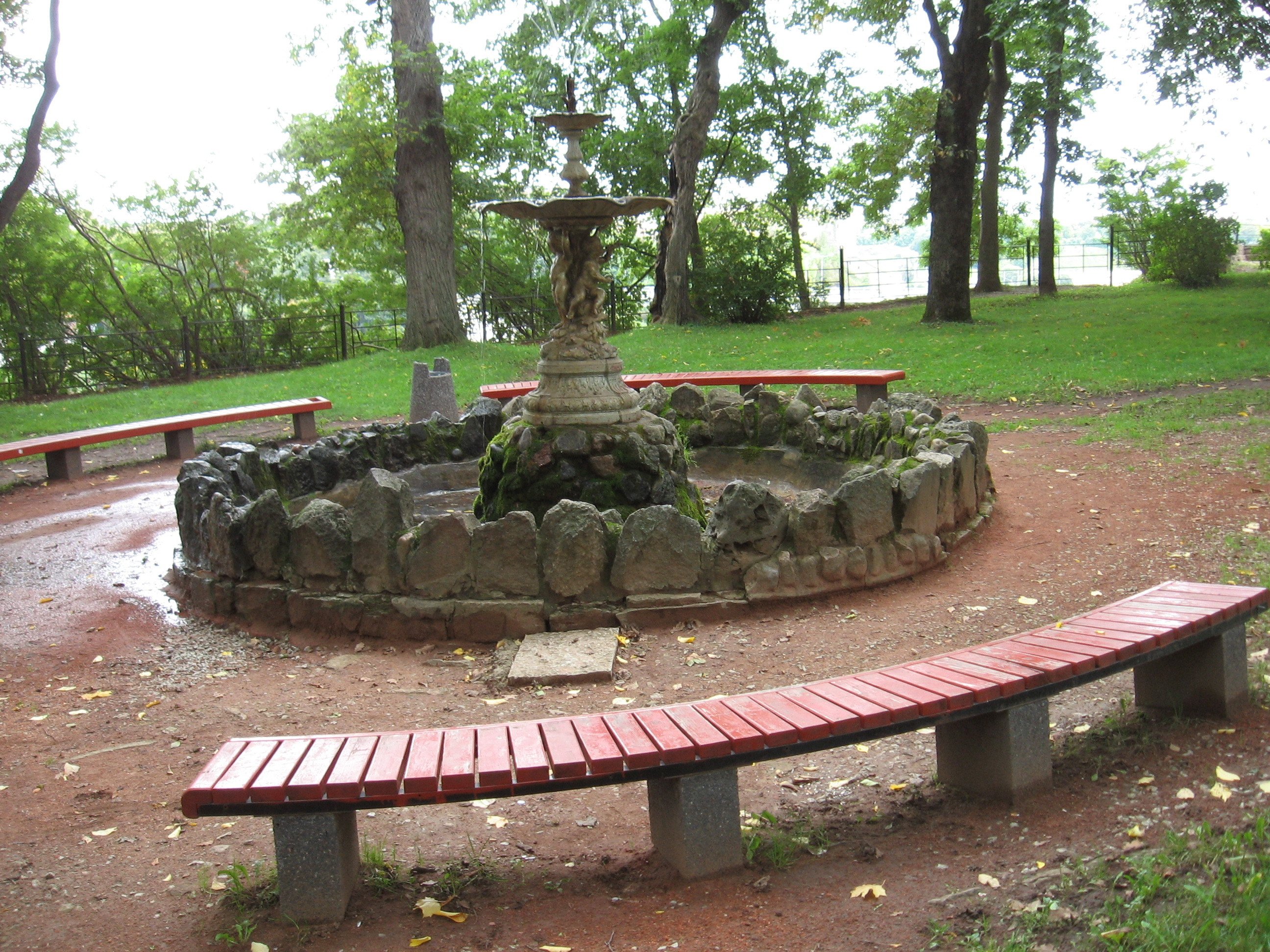 Purskkaev Narvas bastionil Pax